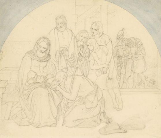 Die Anbetung des Kindestitle QS:P1476,de:"Die Anbetung des Kindes" label QS:Lde,"Die Anbetung des Kindes"